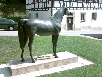 Statue des Arabers Hadban Enzahi OX auf dem Gelände des Haupt- und Landgestüts Marbach, selbst fotografiert